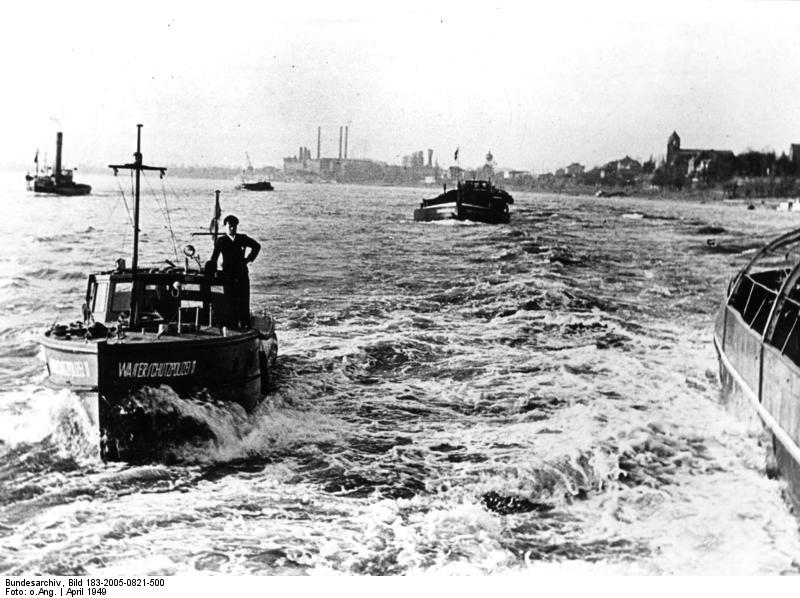 ADN-ZB/Illus-dpd Die Polizei, die regelt den Verkehr... ...auch auf dem Wasser. Der Abschnitt des Rheins zwischen Köln und Bonn wird bereits wieder von durchschnittlich täglich 180 Schleppdampfern, Kähnen und Motorschleppern in Berg- und Talfahrt passiert. Die Aufsicht über diesen regen Verkehr hat die deutsche Wasserschutzpolizei, die auch auf ausländischen Schiffen die Kontrollerlaubnis hat. Unser Bild zeigt einen Ausschnitt vom regen Schiffsverkehr auf dem Rhein. Im Vordergrund: ein Boot der Wasserschutzpolizei. Die Boote werden jetzt wieder mit Funk- und Funksprechanlagen ausgerüstet werden. 22-4-49